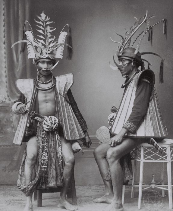 foto. Studioportret van twee mannen in krijgskleding, Zuid-Nias